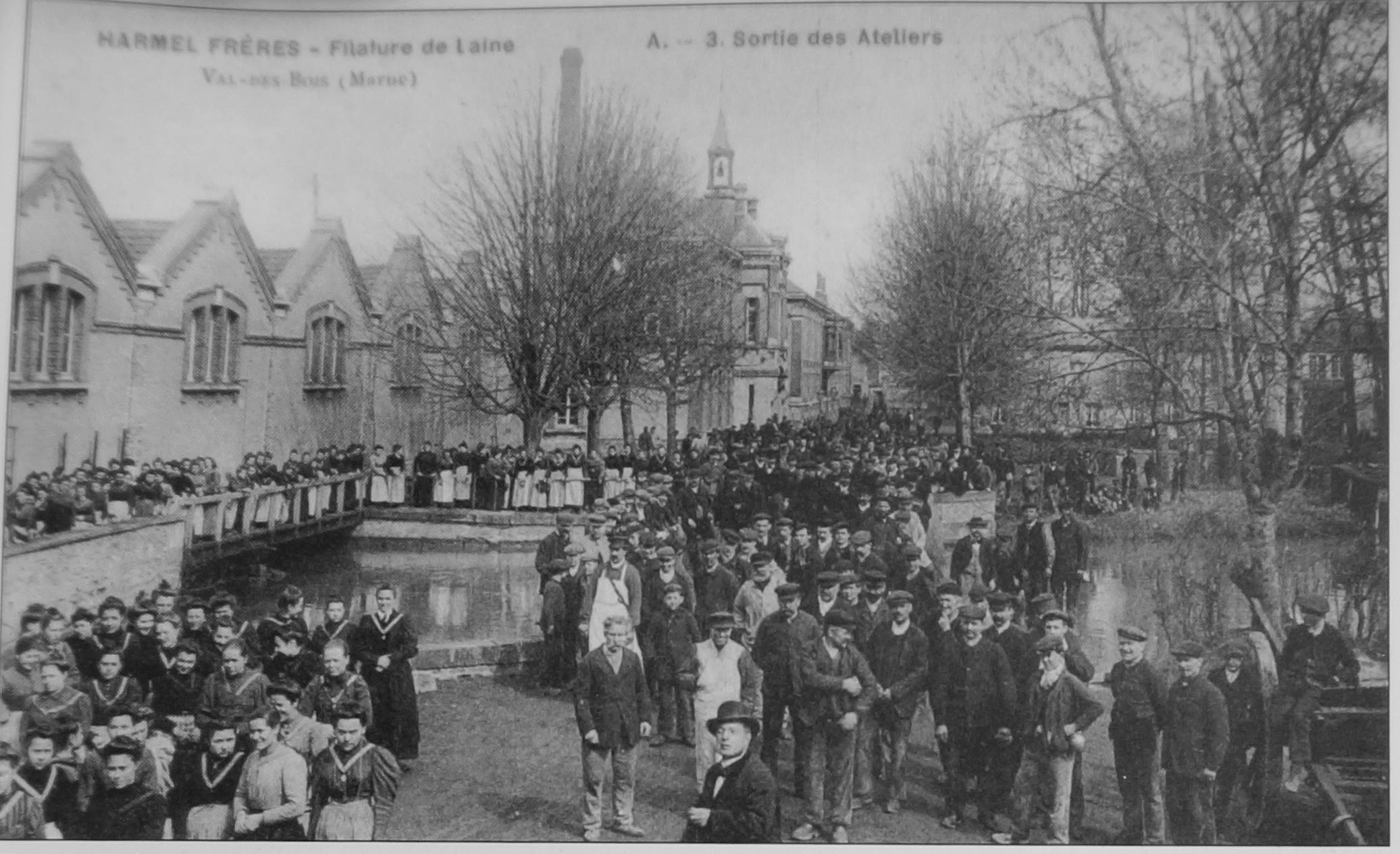 vue de cf titre.